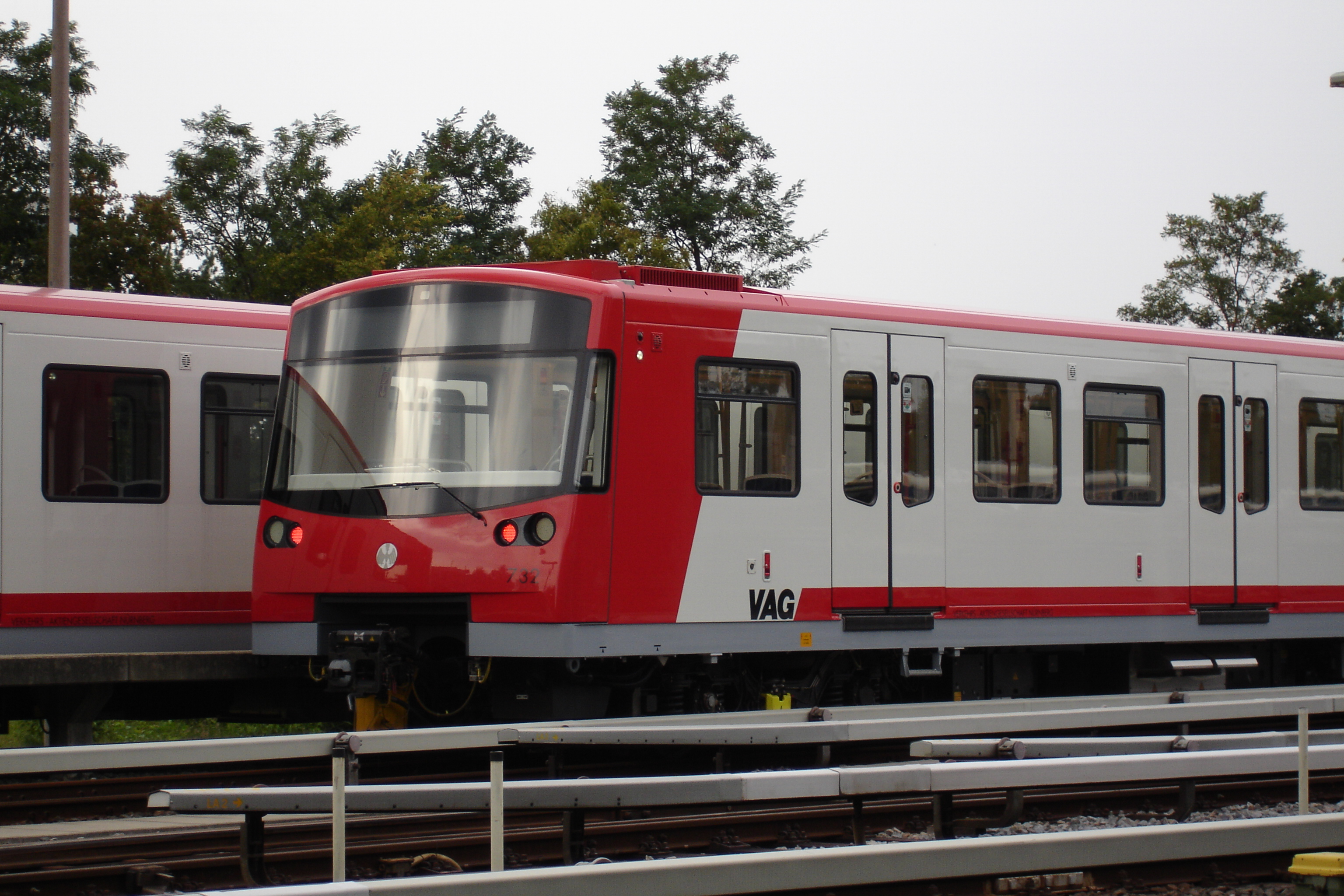 DT3s abgestellt beim Betriebshof in Nürnberg-Langwasser